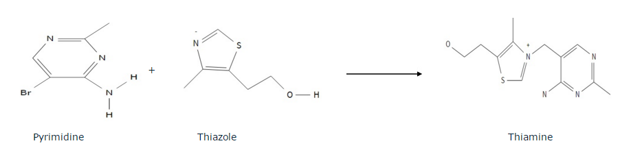 Synthèse